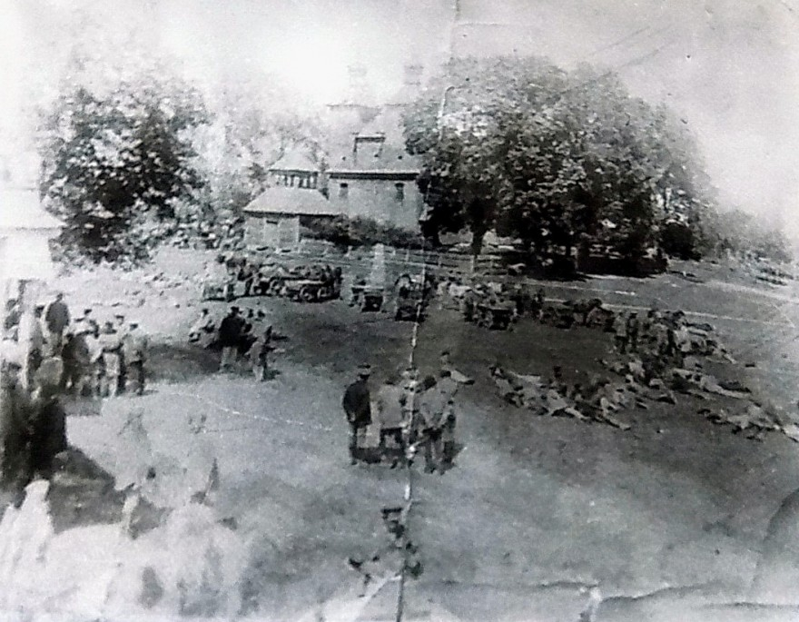 Беларуская (тарашкевіца): Валосавічы (Vałosavičy), пляц Рынак (plac Rynak). Царква